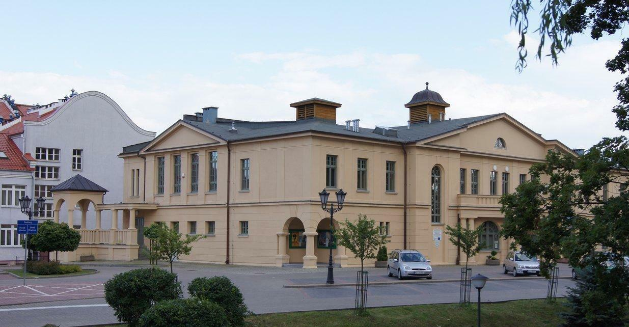 Kinoteatr Pasja. W latach powojennych było tutaj kino. Przed II wojną światową, w budynku tym obradowali rajcy miejscy